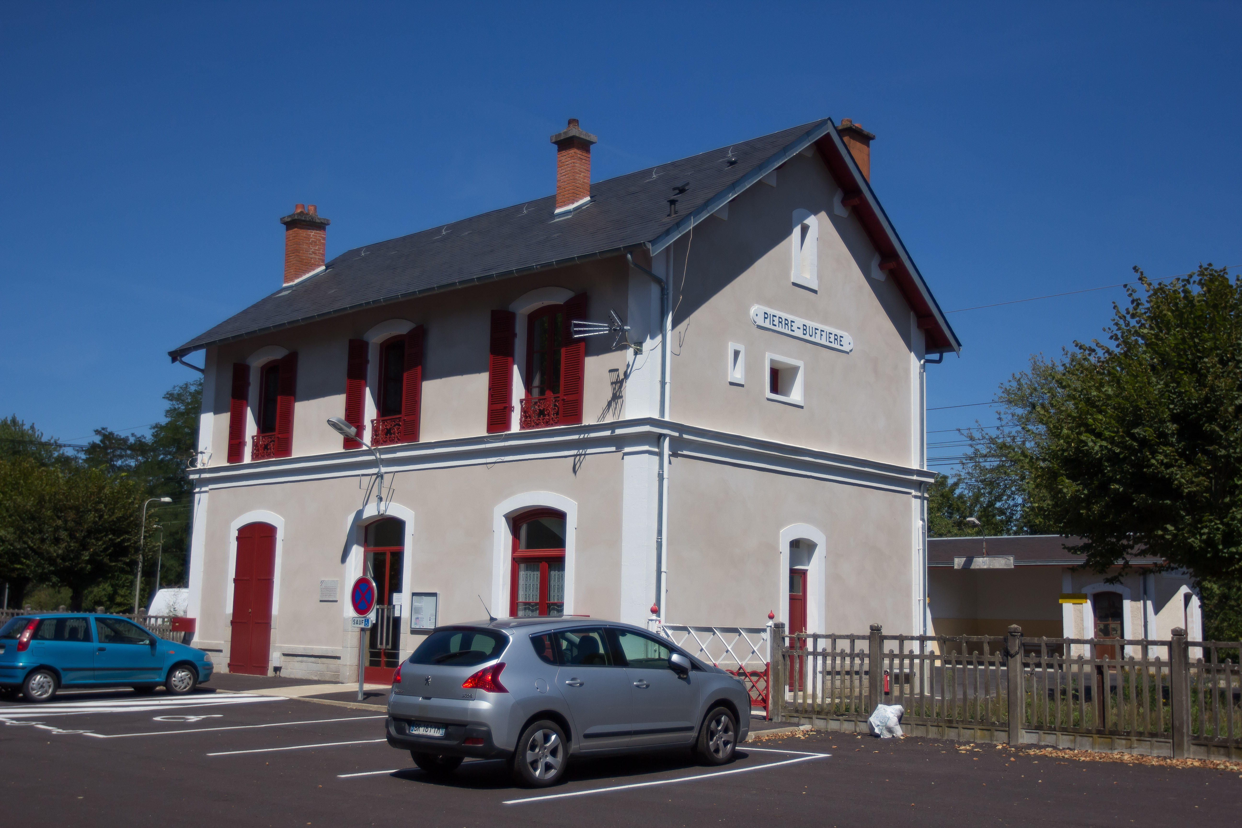 La gare de Pierre-Buffière / Commune de Pierre-Buffière / Haute-Vienne / France